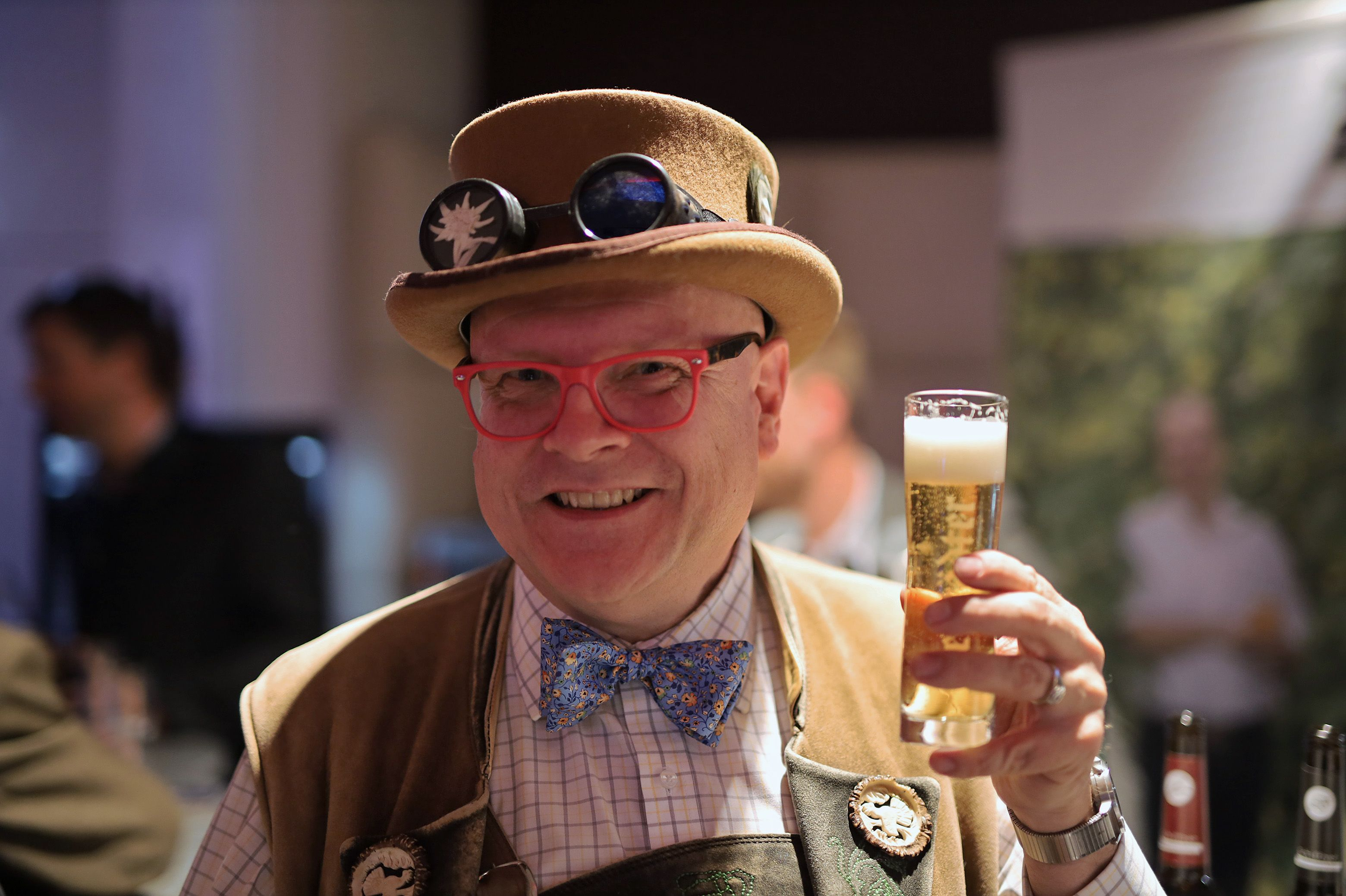 Präsentation des Bierguide 2019 durch Bierpapst Conrad Seidl in Linz, photo by Medianet/Hartl